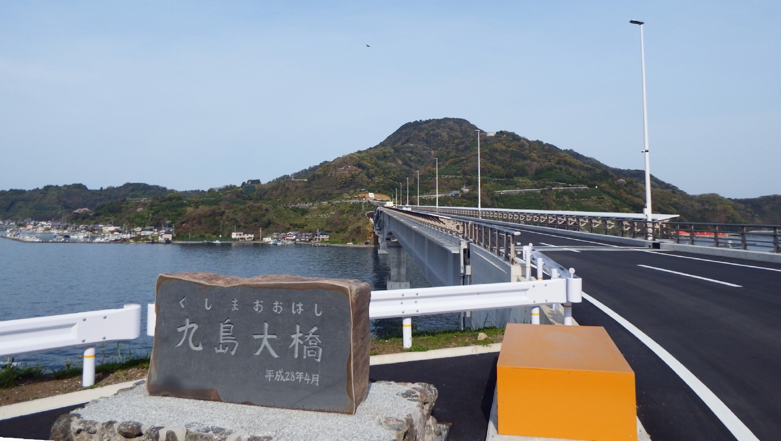 九島大橋を四国本土側から